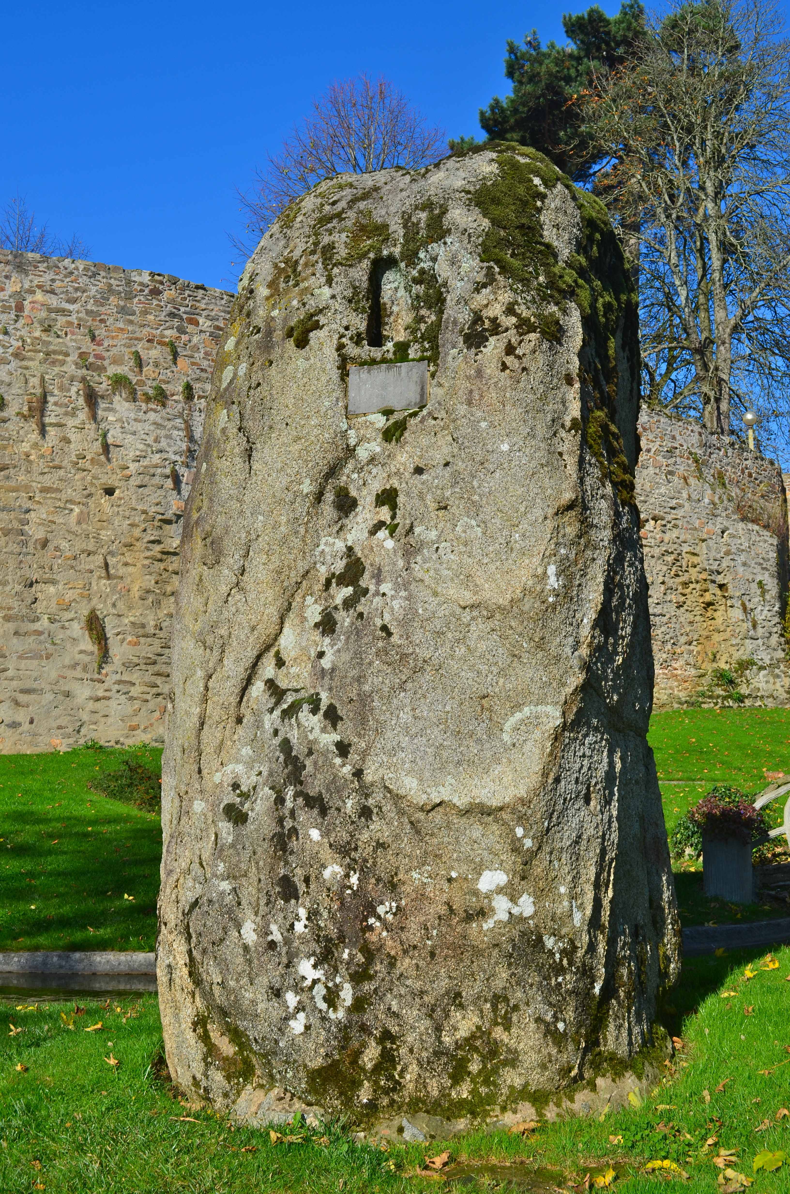 Menhir de la Garde - Cholet (Maine-et-Loire)